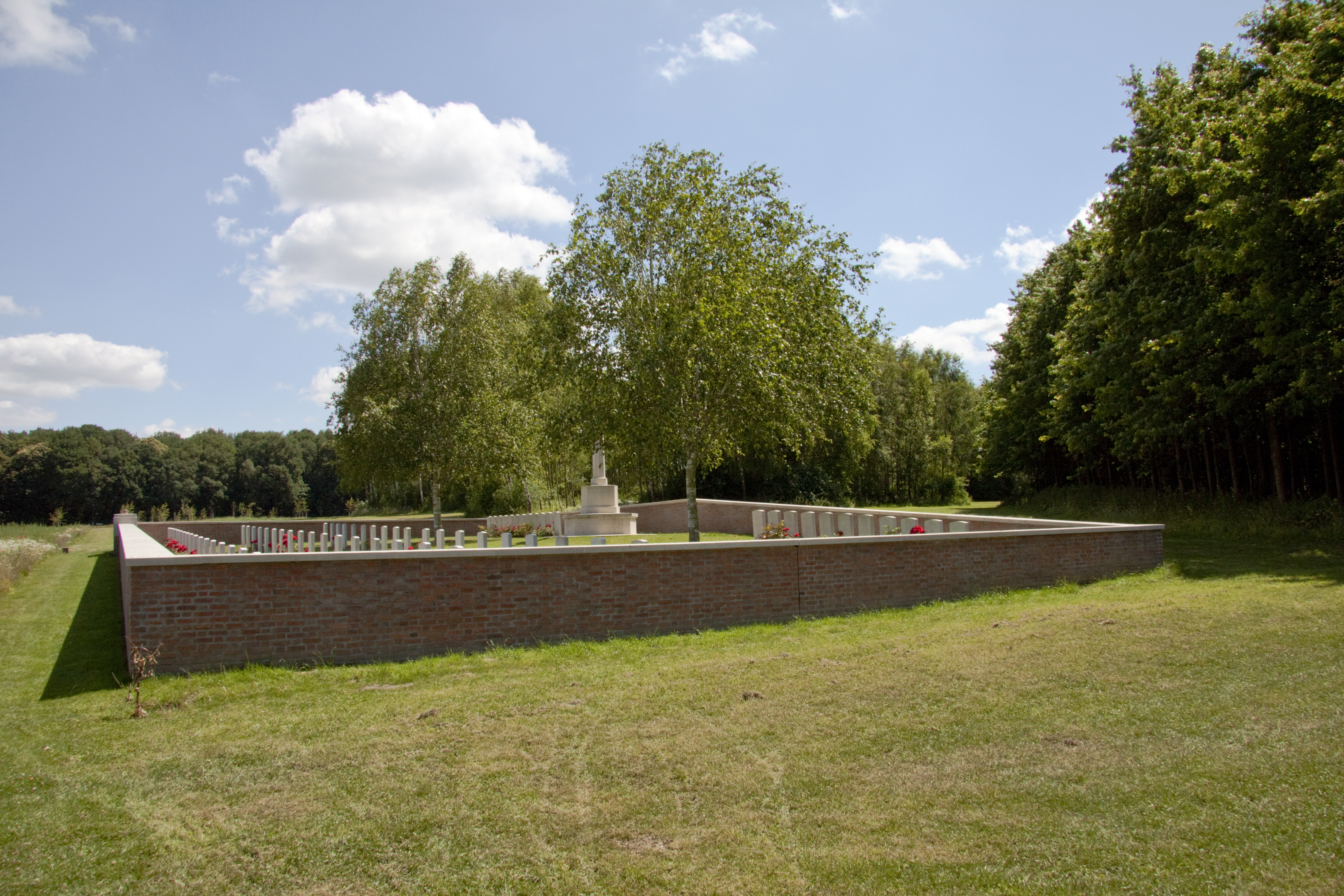 First D.C.L.I. Cemetery, The Bluff